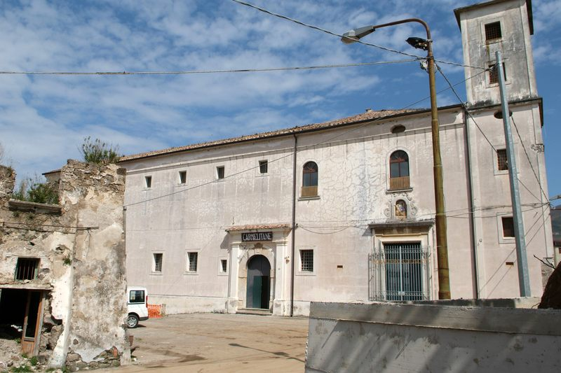 Convento delle Carmelitane, piazza San Giuseppe, Fisciano